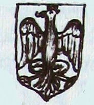 (Stemma della famiglia Turco di Asti- da un disegno dell'Incisa del 1806.